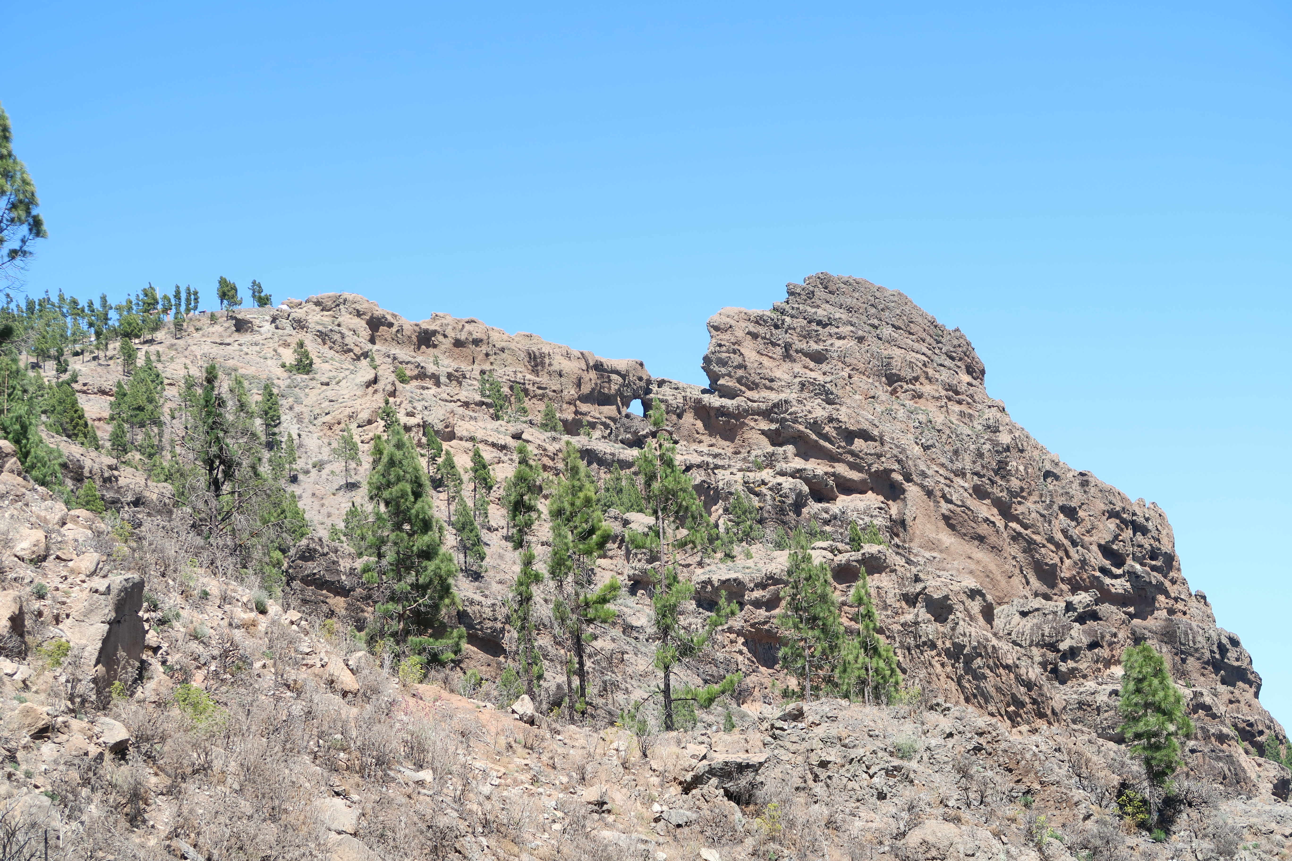 vista desde el sur